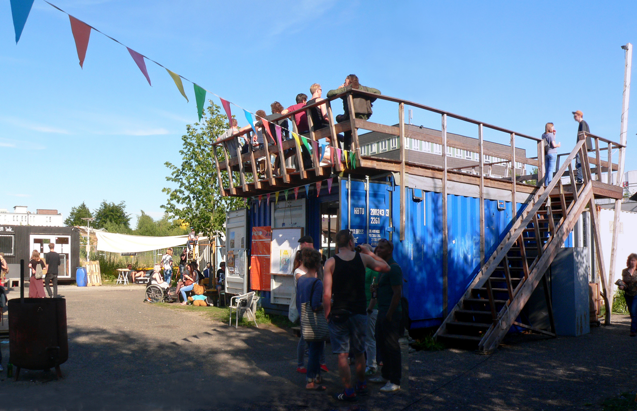 Sommerfest Platzprojekt Hannover